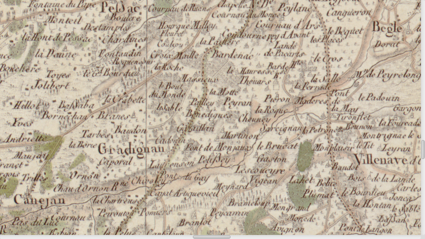 Carte de Cassini n°104 ː Bordeaux, zoom sur Gradignan, 1756.